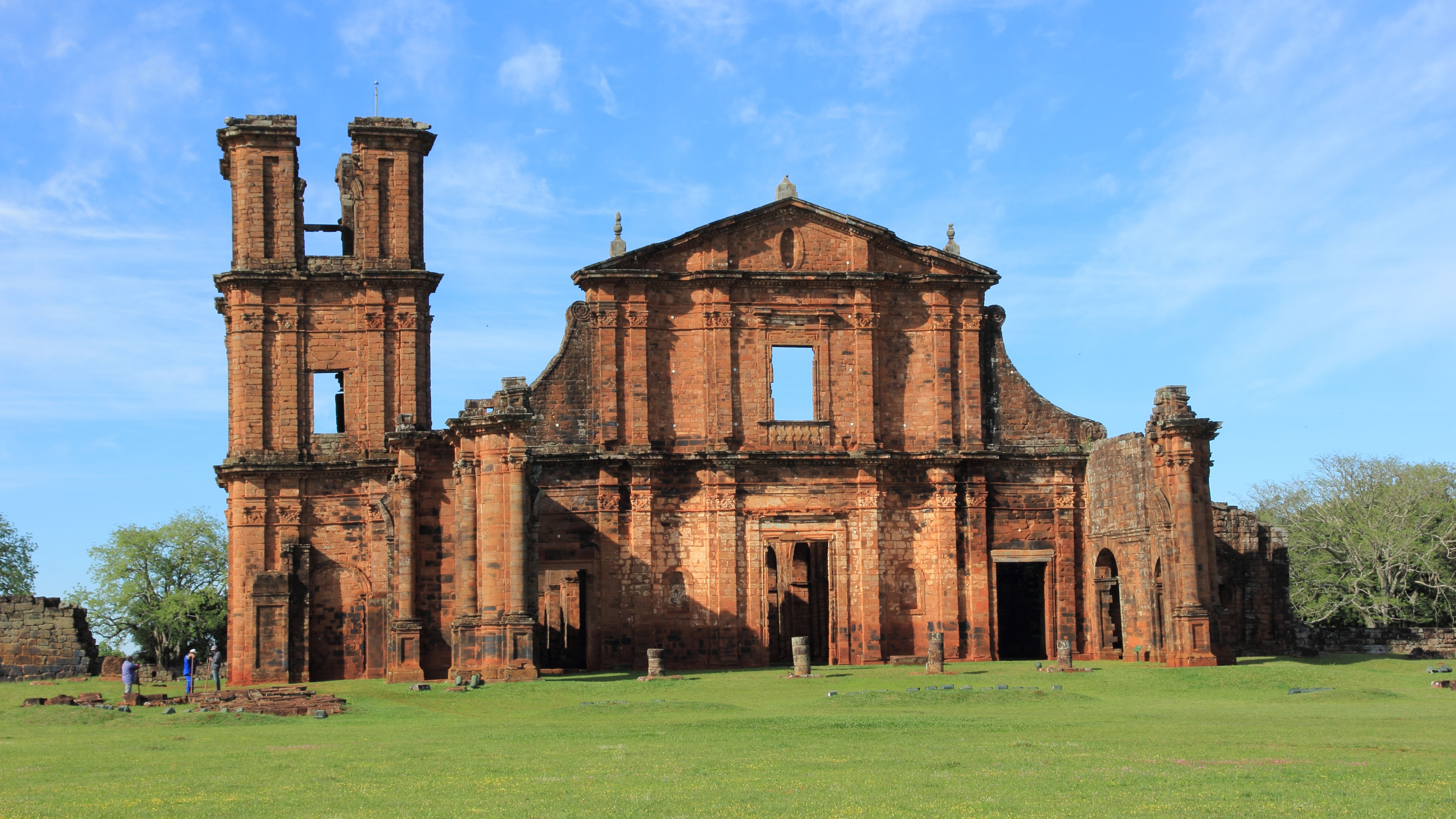 Sítio Arqueológico de São Miguel Arcanjo em São Miguel das Missões, RS.